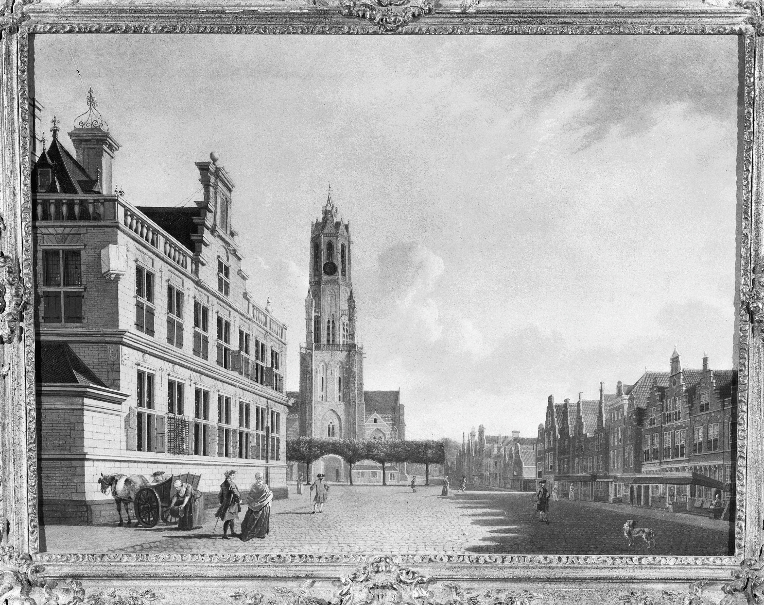 Nieuwe Kerk: schilderij J.ten Compe (1755) Gezicht op de Markt te Delft